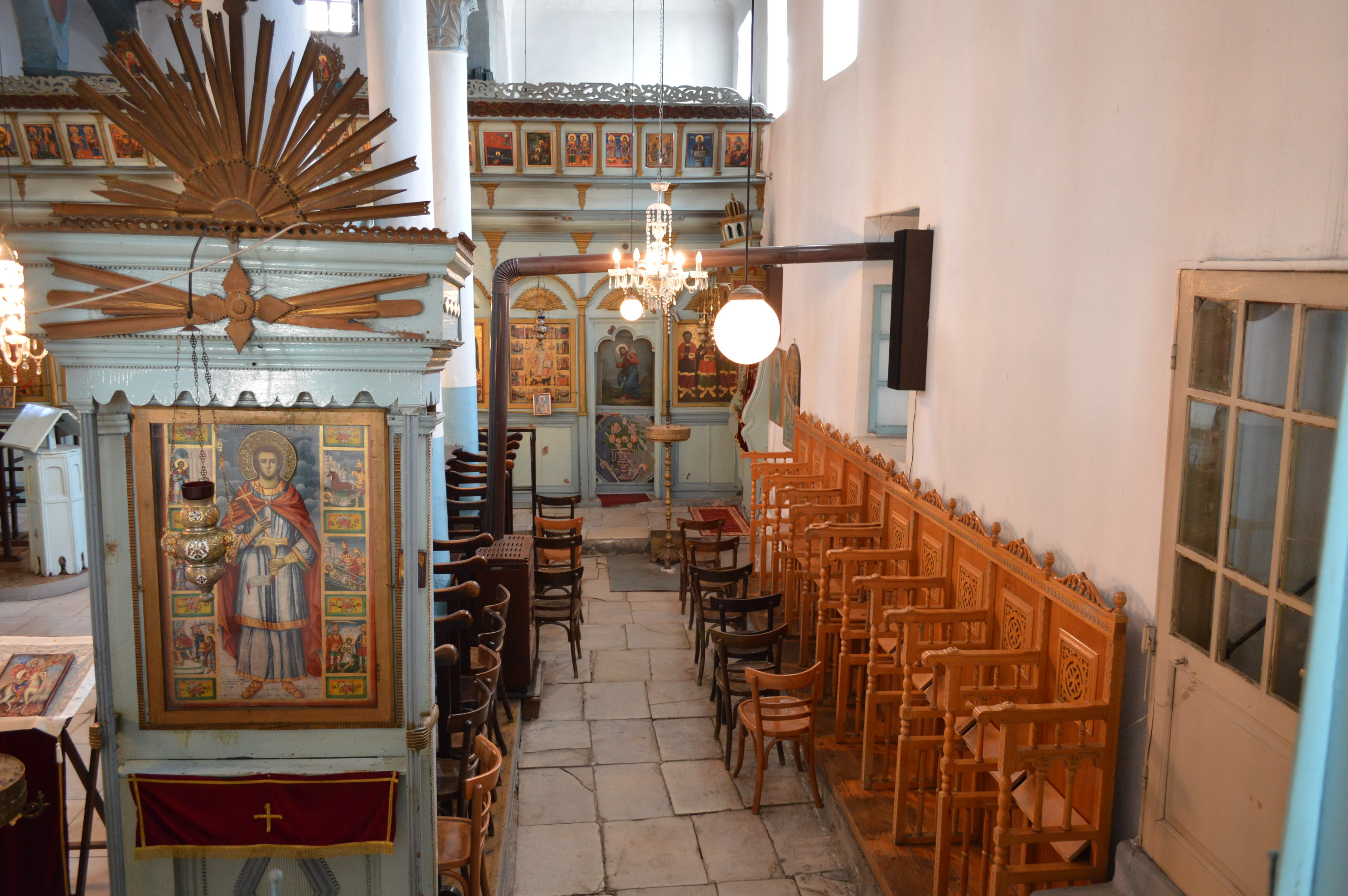 Εσωτερικό του Ναού (2)